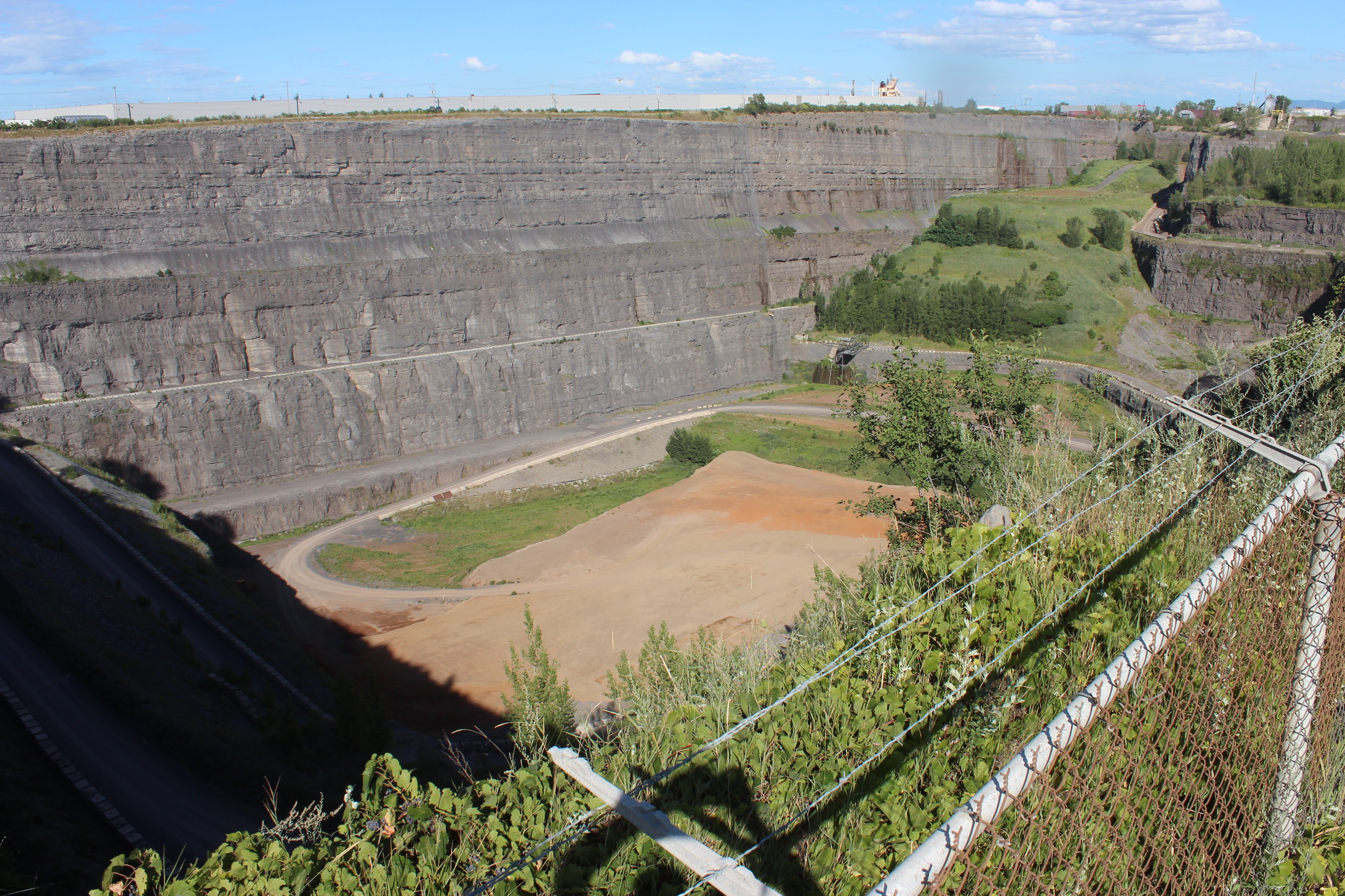 Old Demix quarry in Montreal-Est used for wastewater ashes.